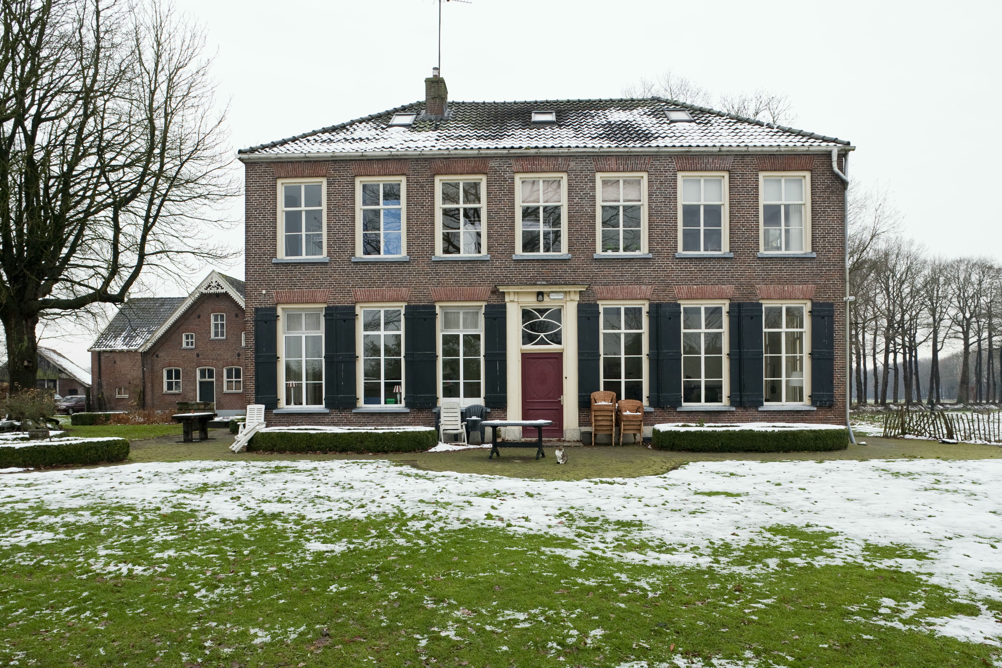 Boerderij Roerdinkhof: Overzicht voorgevel boerderij met ingangspartij